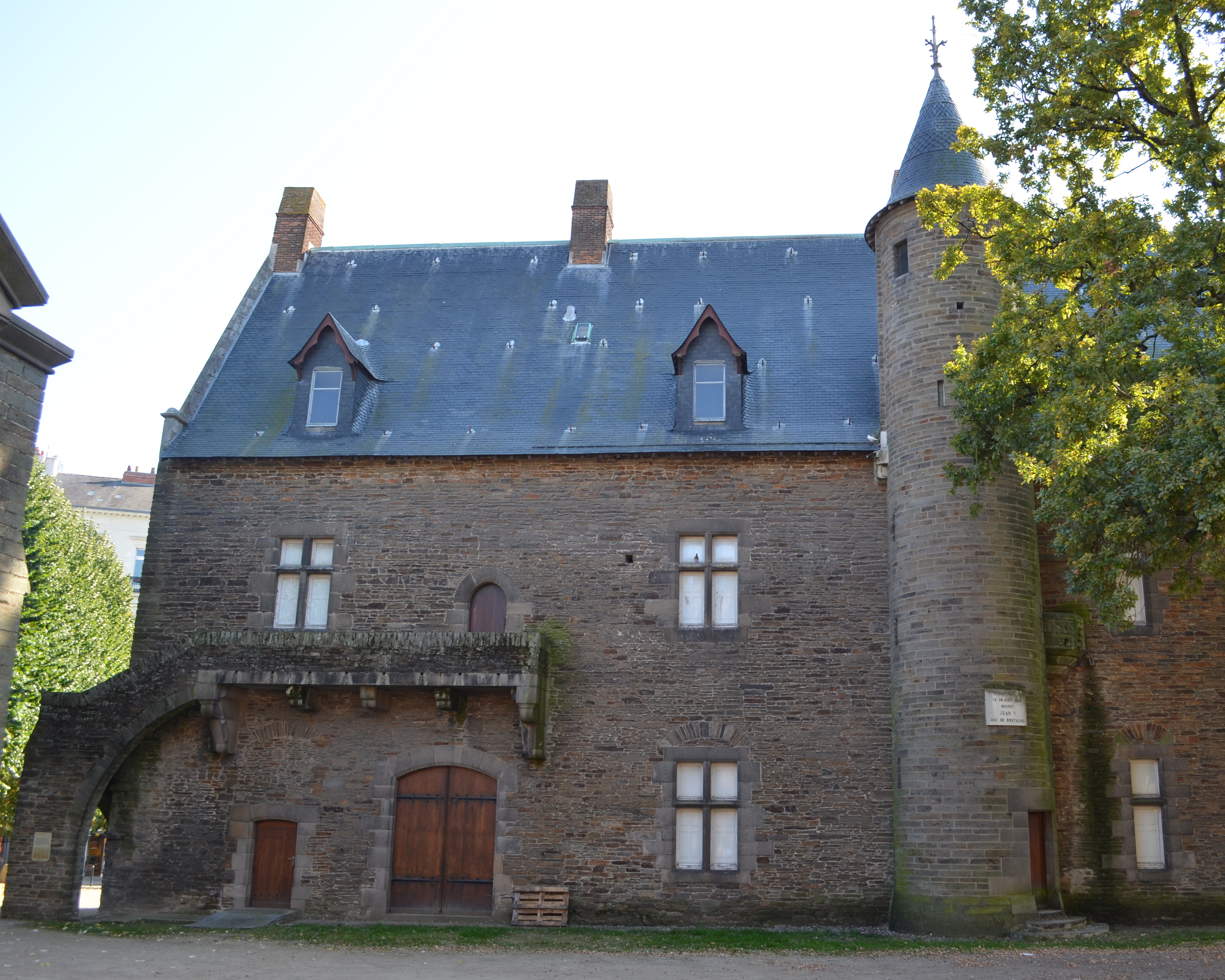 Manoir Jean V ou Manoir de la Touche - Musée Dobrée - Nantes, Loire-Atlantique